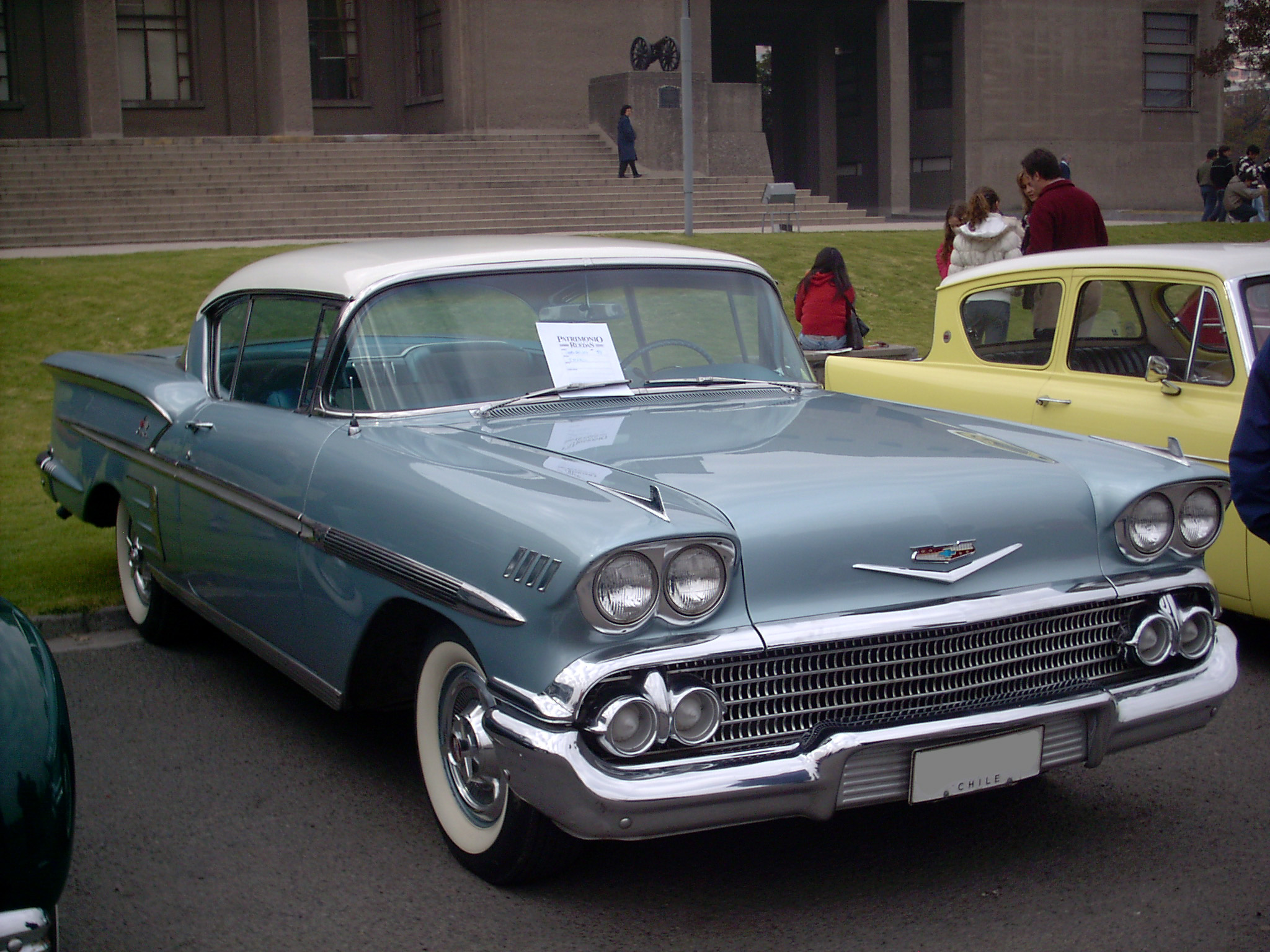 Chevrolet Bel Air Impala Coupe 1958